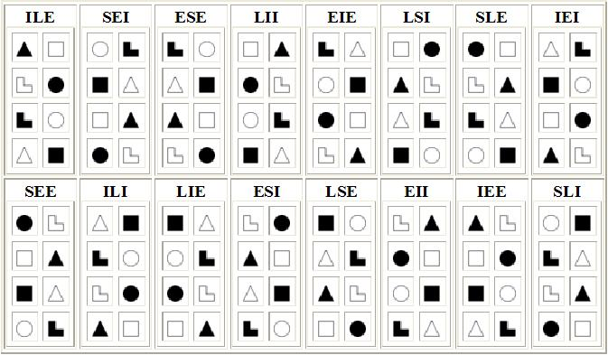 מודל A של 16 הפונקציות הסוציוניות